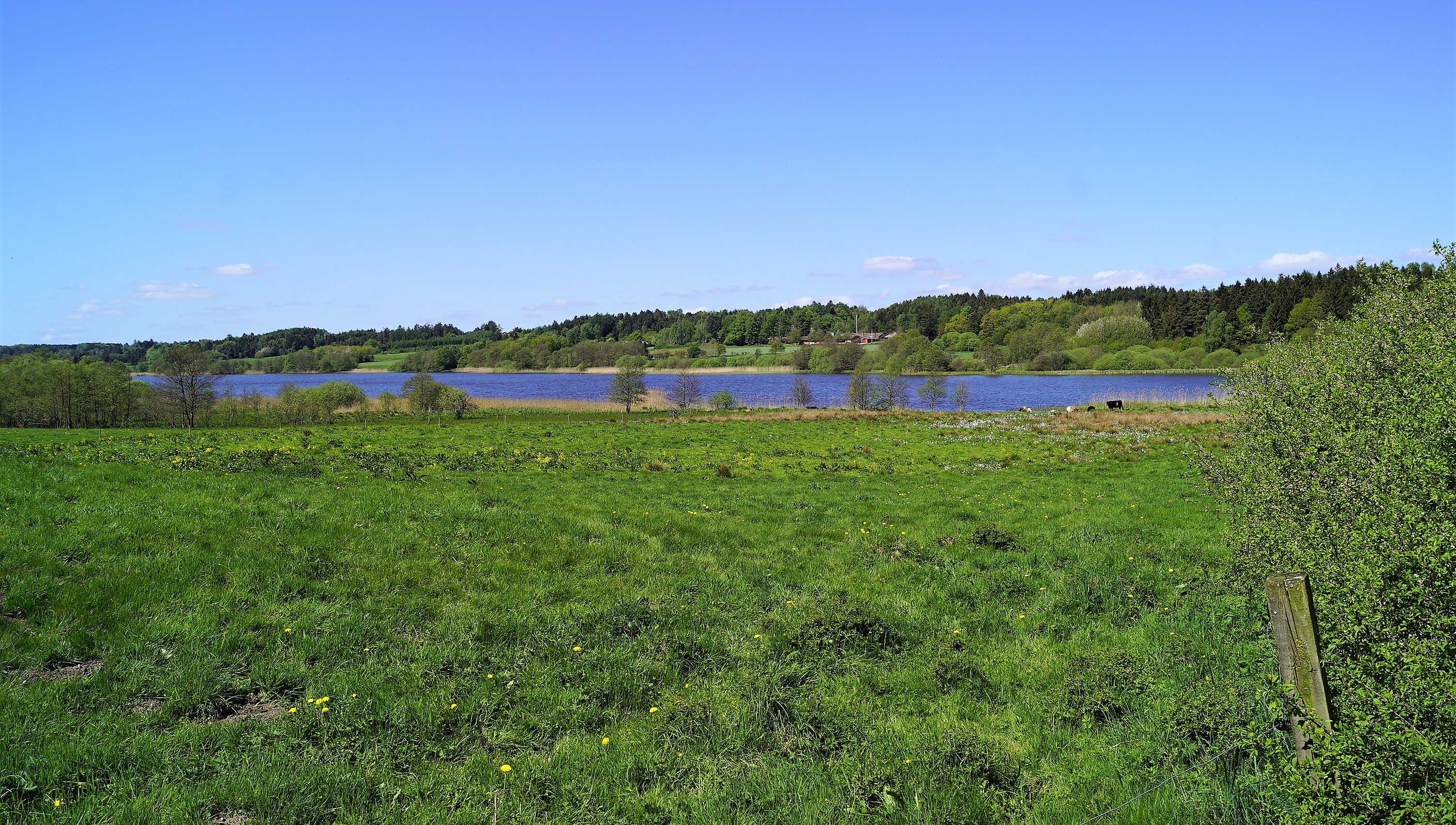 Alling Sø set mod nordvest